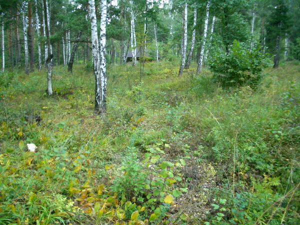 Pingenfeld des neolithischen Feuersteinbergbaus in Krzemionki